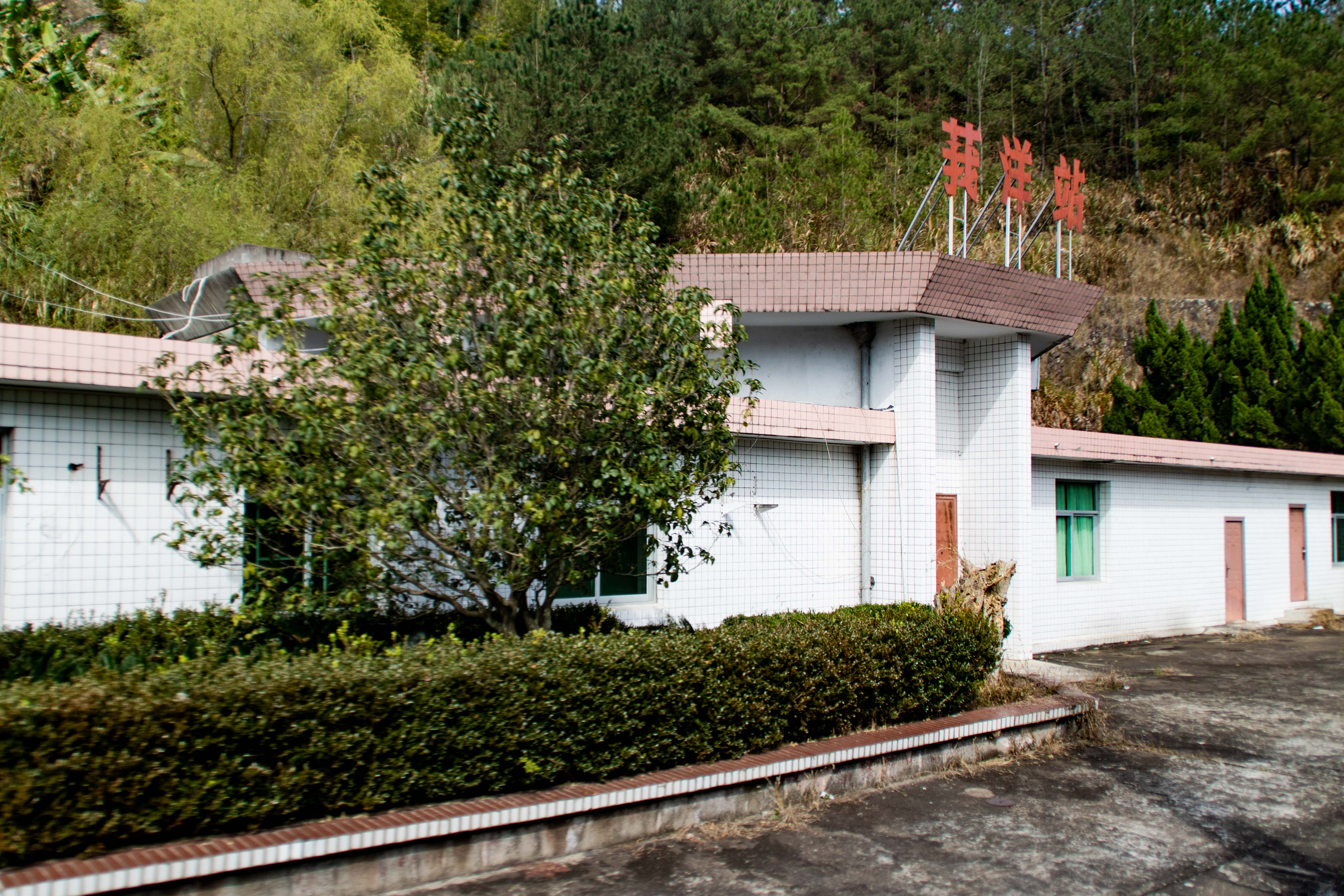 中文（中国大陆）: 莪洋站站房